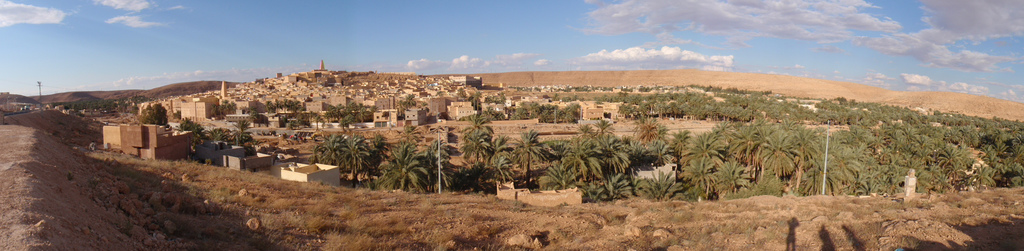 Ghardaia, un panorama.